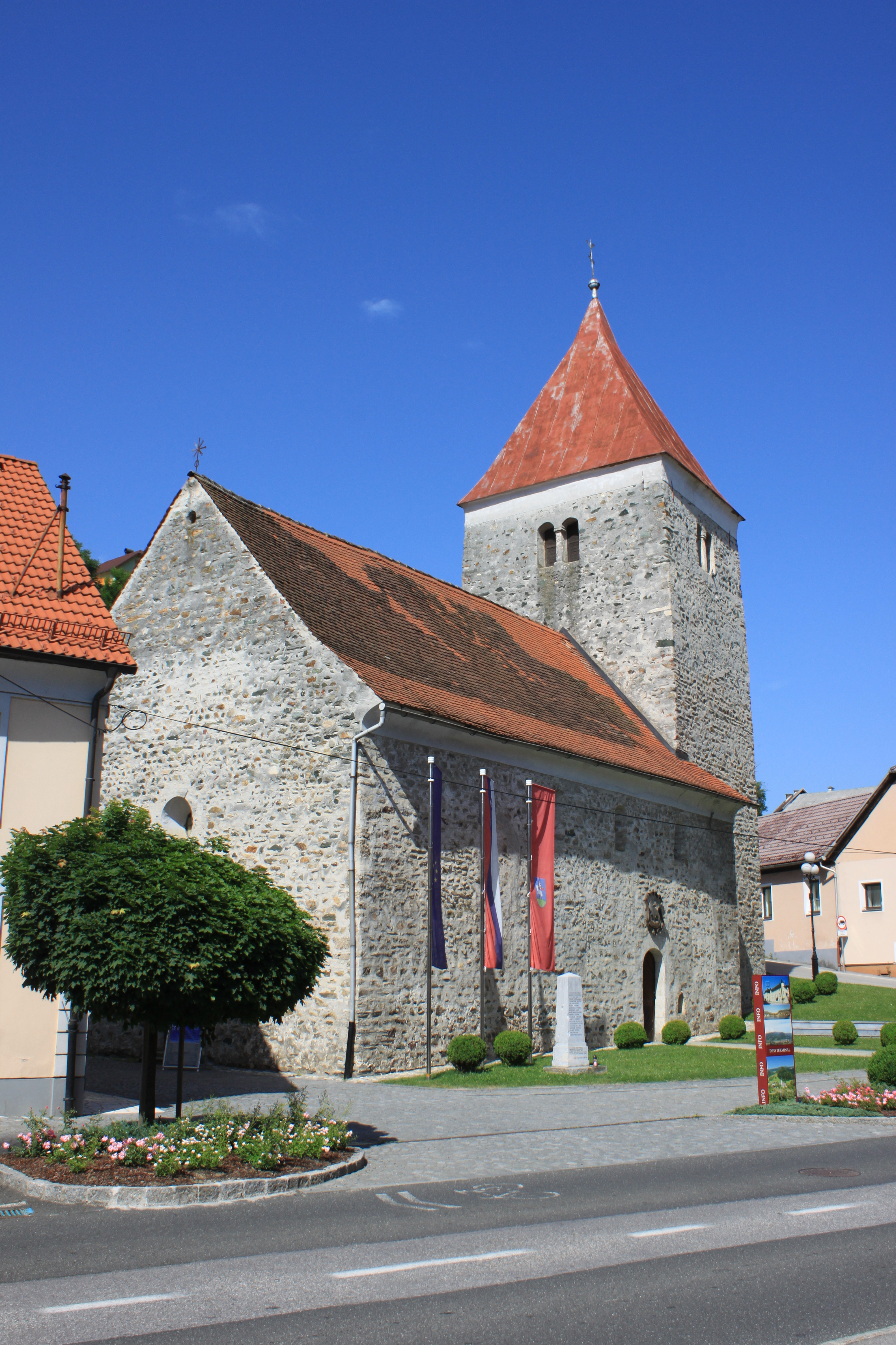 Kirche